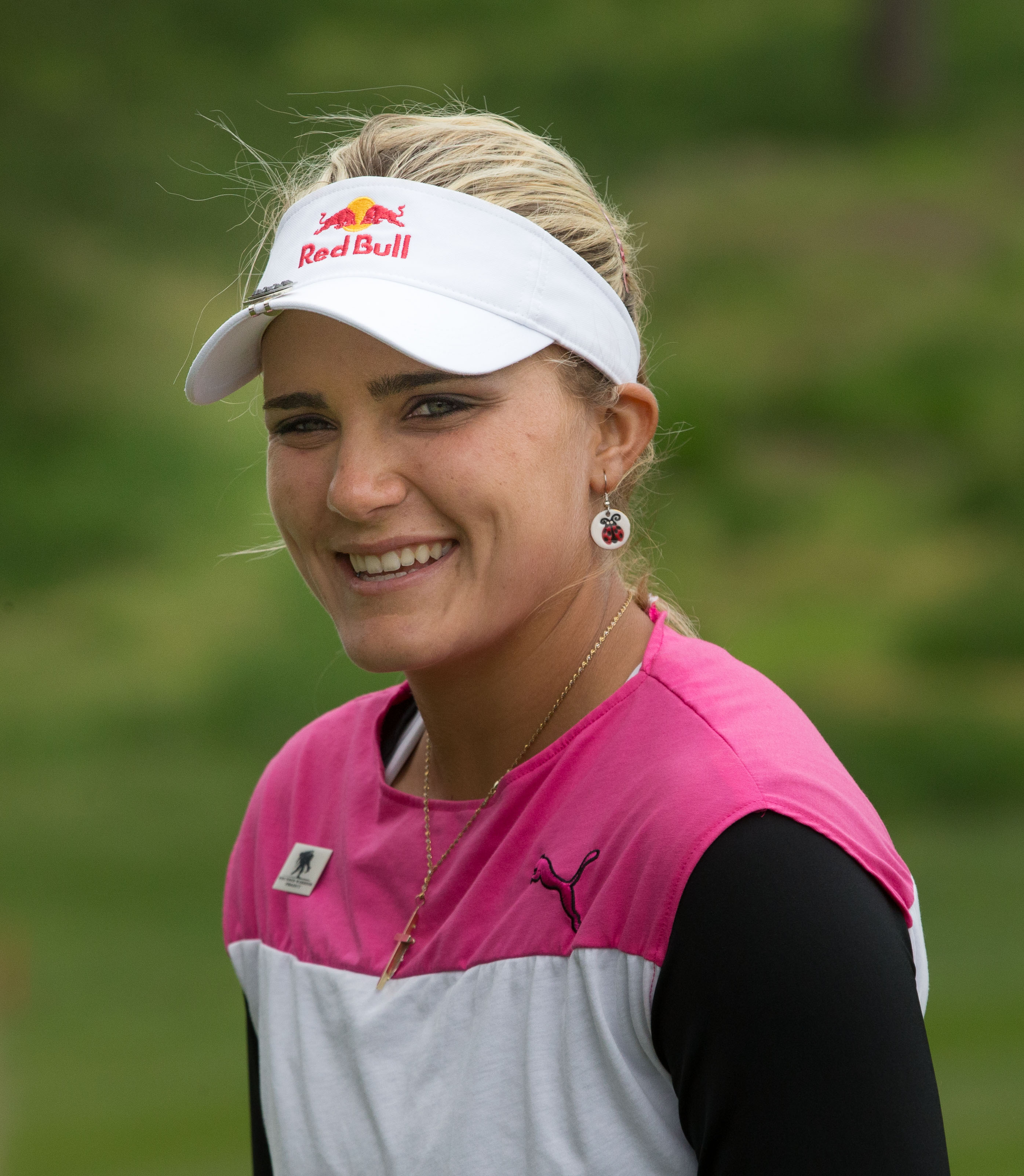 LPGA Kingsmill May 1, 2013